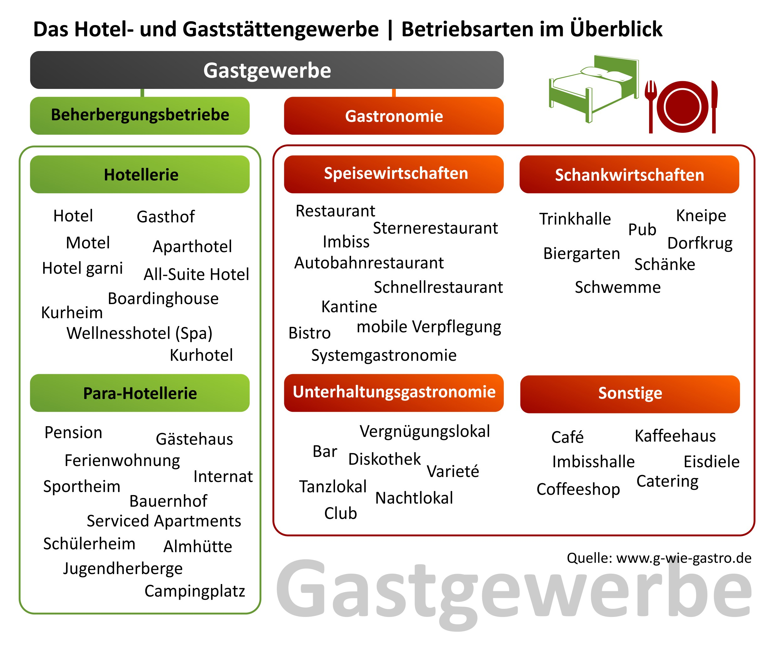 Bei der Grafik handelt es sich um eine schematische Darstellung der meisten Betriebsarten im Gastgewerbe